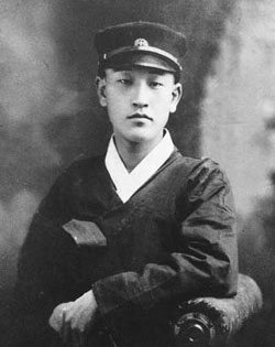 李相和（詩人）